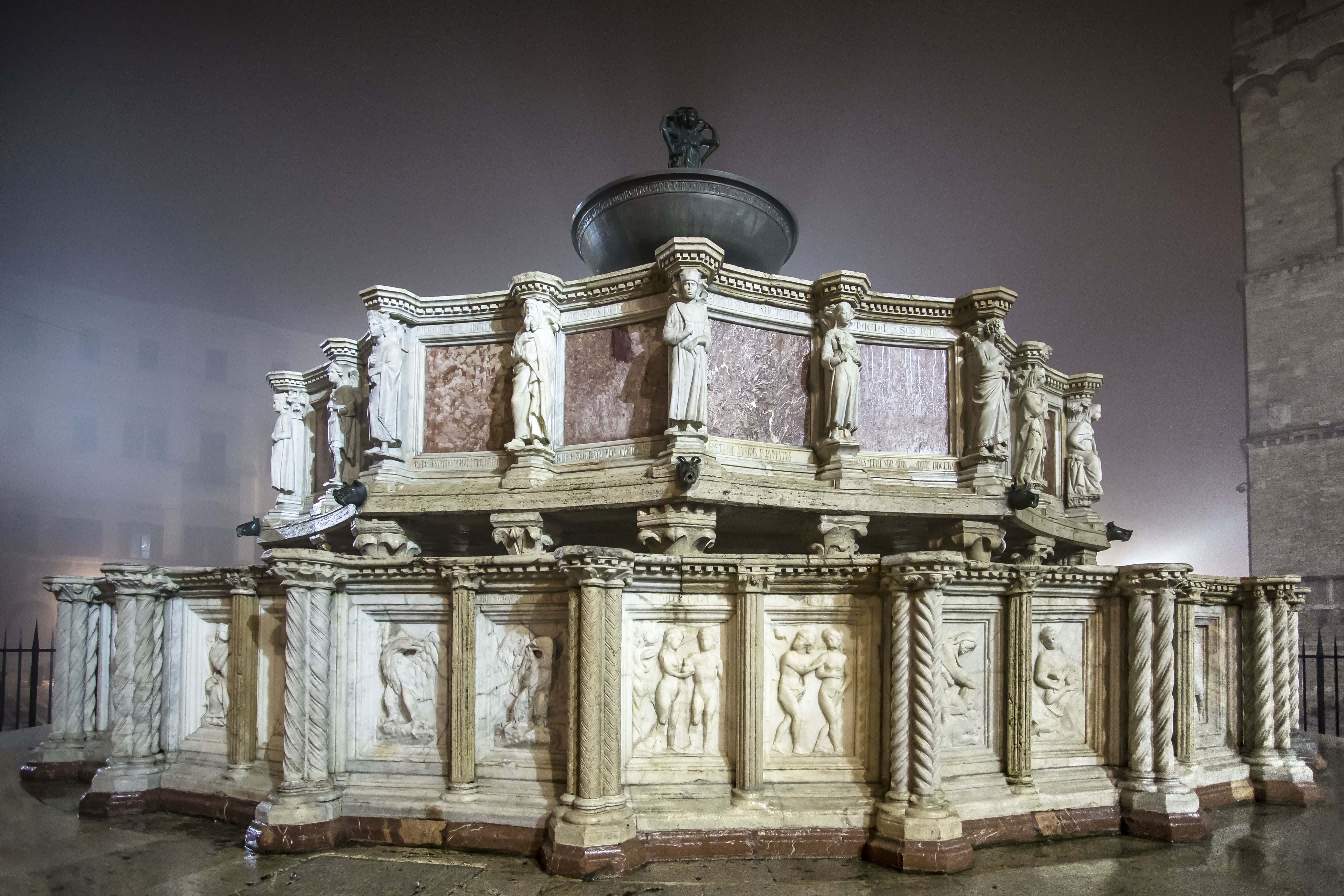 Fontana Maggiore This is a photo of a monument which is part of cultural heritage of Italy.